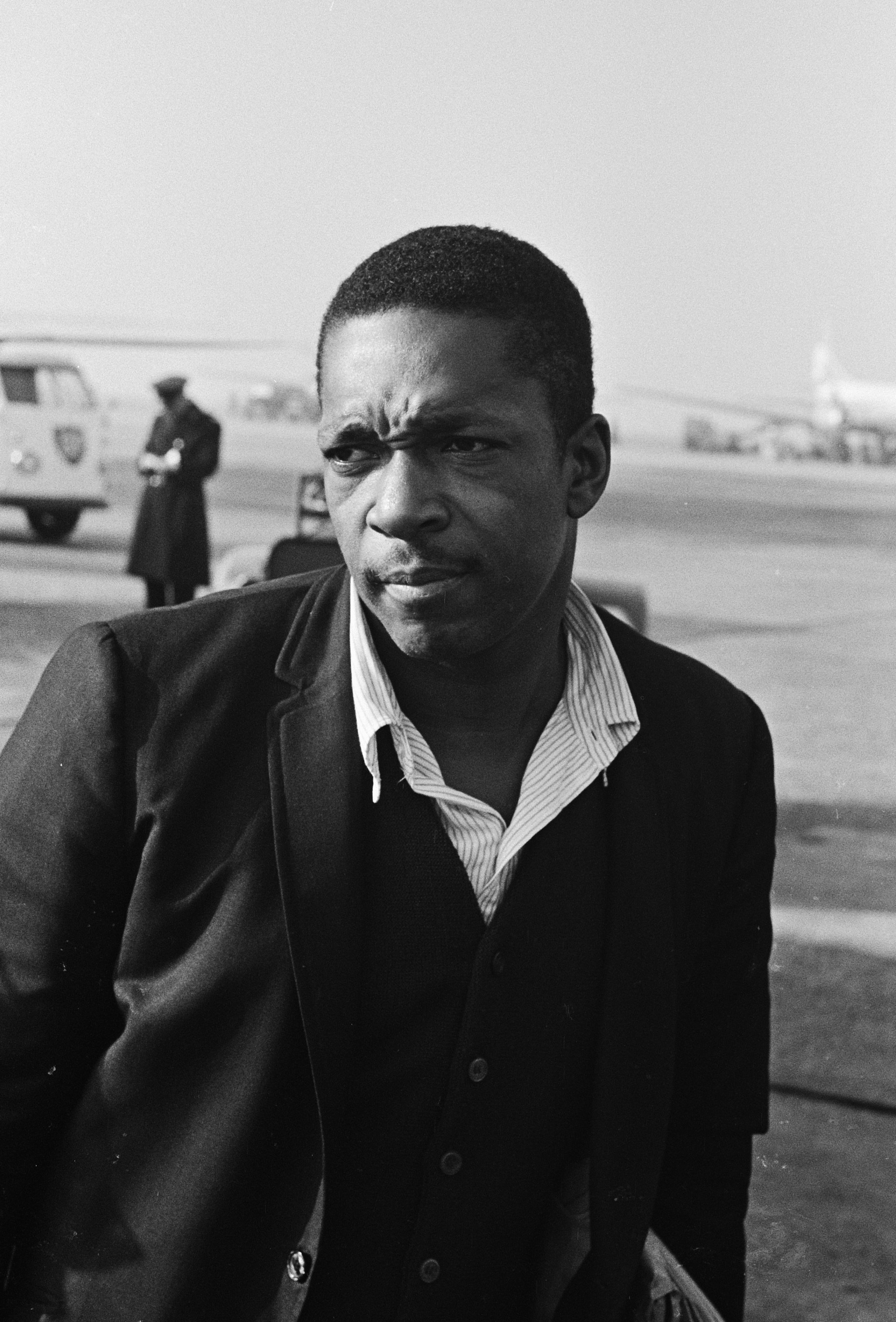 Amerikaanse jazz-saxofonist John Coltrane op Schiphol aangekomen. John Coltrane